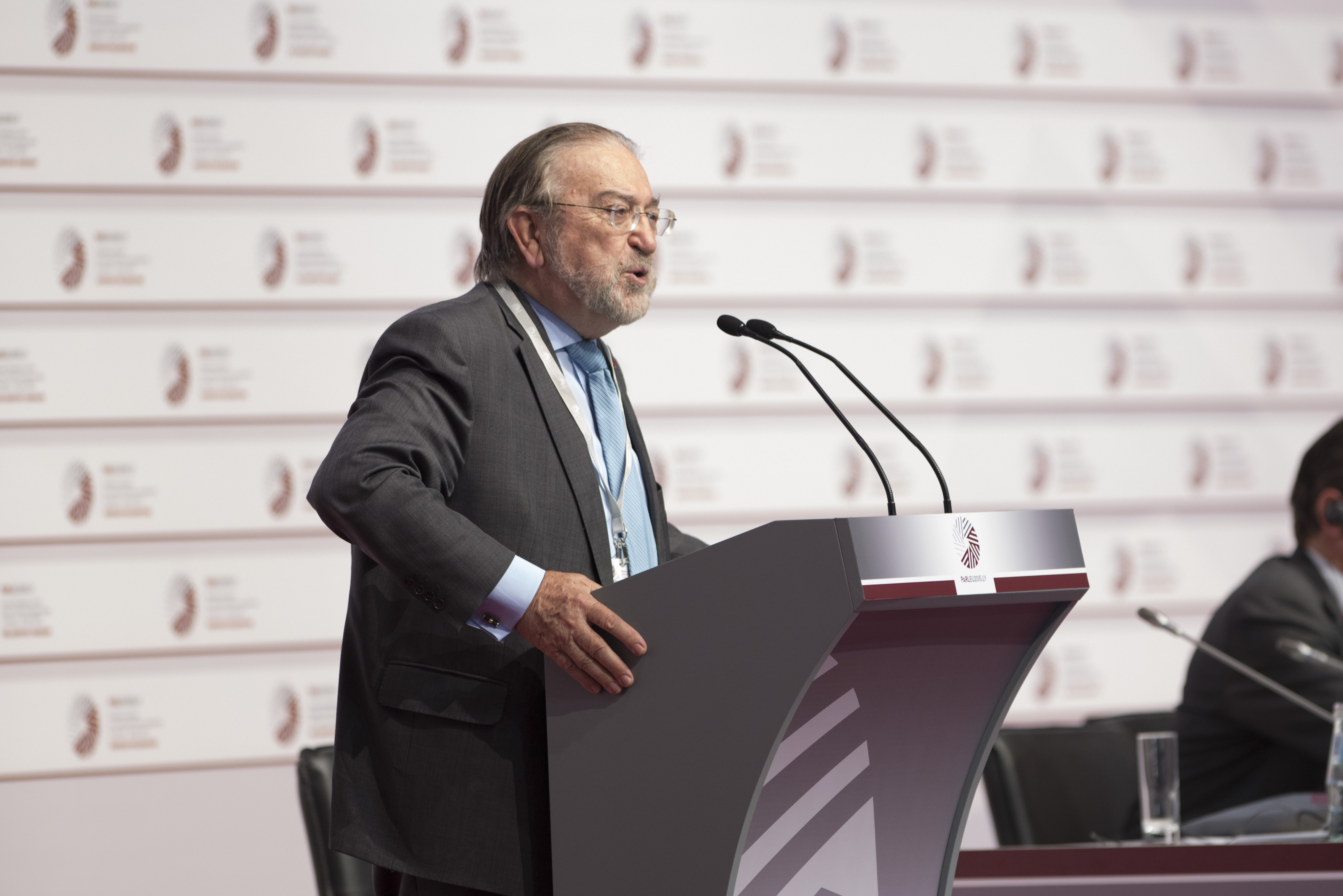 2015.gada 2.jūnijs. LIII COSAC plenārsēde. Foto: Reinis Inkēns, Saeimas Kanceleja Izmantošanas noteikumi: saeima.lv/lv/autortiesibas